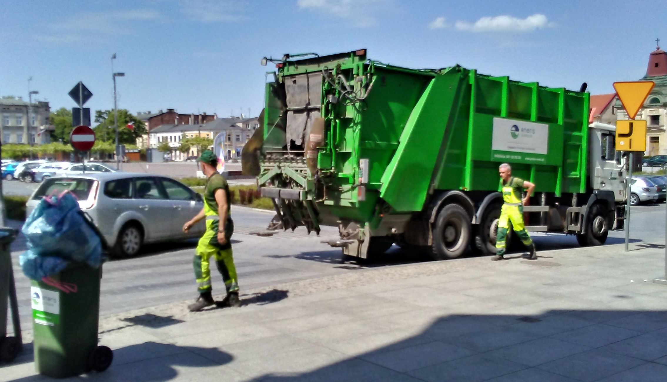 Wywóz śmieci w Tomaszowie Mazowieckim, województwo łódzkie